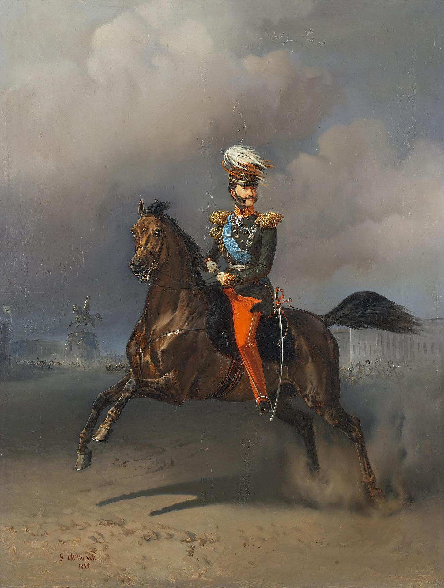 Граф Владимир Фёдорович Адлерберг 1-й (1791—1884) — приближённый Николая I, генерал от инфантерии, генерал-адъютант, в 1852-70 годах — министр двора и уделов. Брат статс-дамы Ю. Ф. Барановой: имя при рождении: Эдуард Фердинанд Вольдемар фон Адлерберг, или Эдвард Фердинанд Вольдемар Адлерберг нем.: Eduard Ferdinand Woldemar von Adlerberg (Porträt von Franz Krüger - 1851) швед.: Edvard Ferdinand Voldemar Adlerberg py-aнгл. pоманизатция: Graf Vladimir Fyodorovich Adleberg I